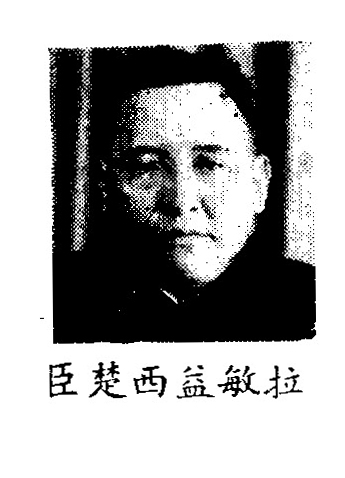 中文（中国大陆）: 制憲國民大會代表